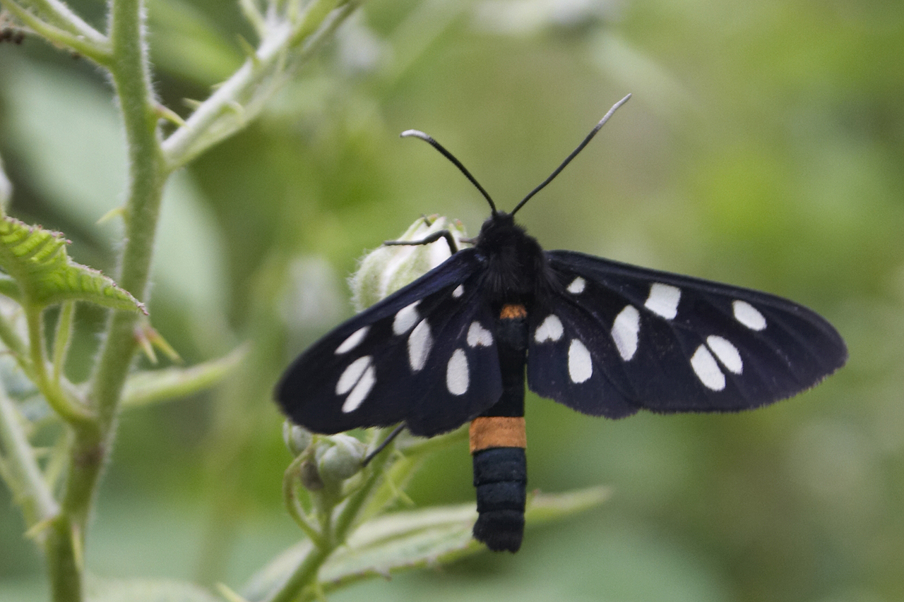 Amata phegea